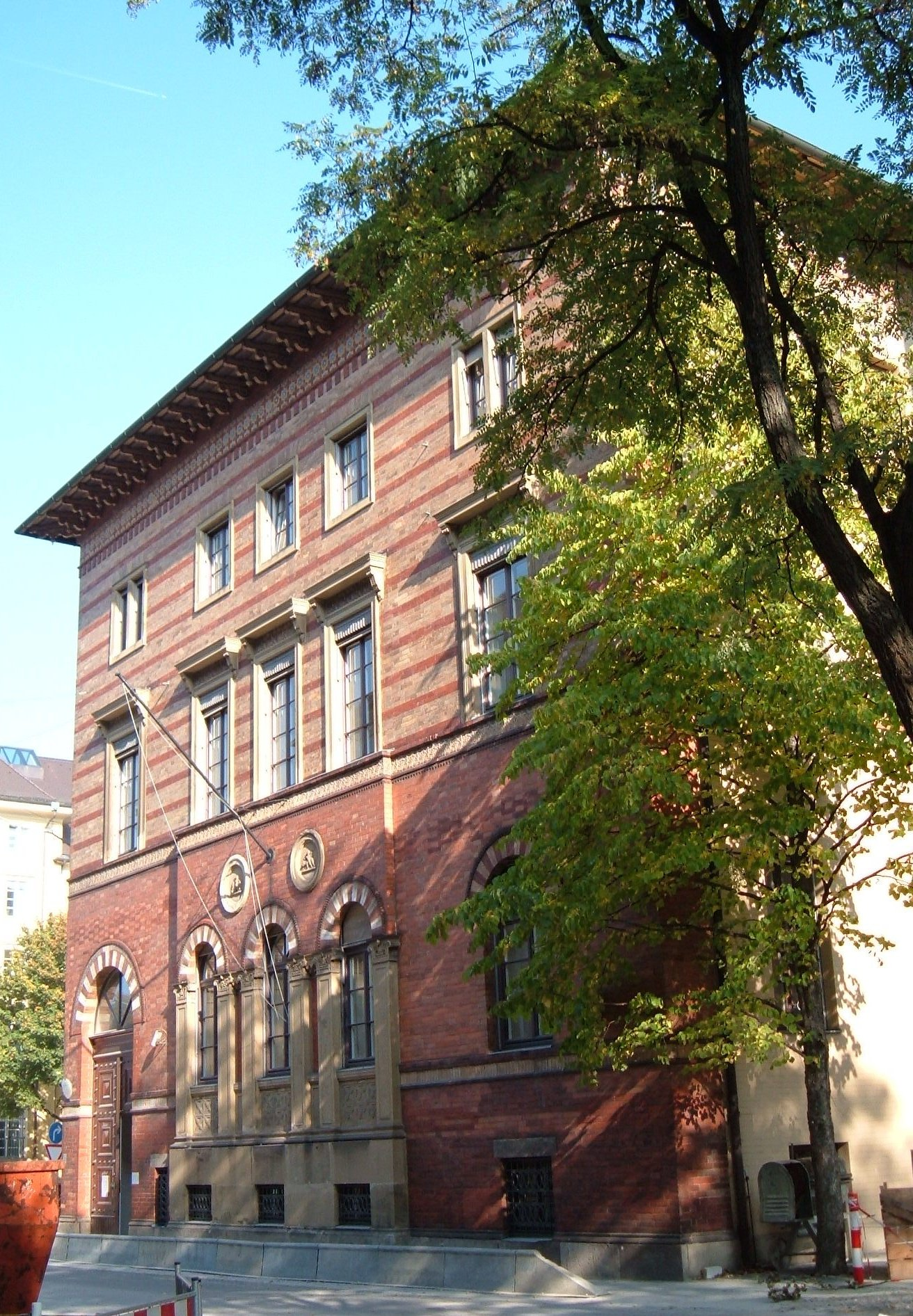 Palais Dürckheim, München